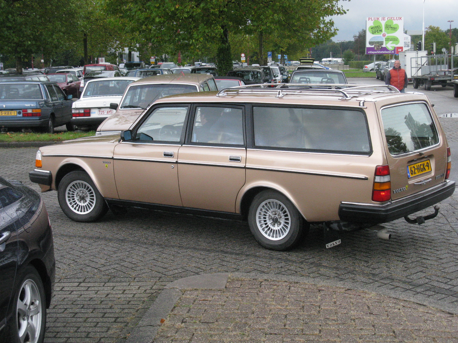 Volvo Klassiekers Beurs, Utrecht